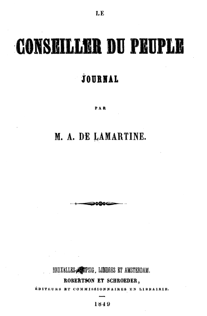 Couverture du Conseiller du peuple, extrait du pdf au Google Books.